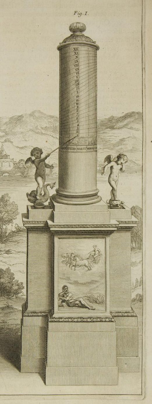 Extérieur de l'horloge hydraulique de Ctésibios, vue par Perrault (XVIIIe siècle).